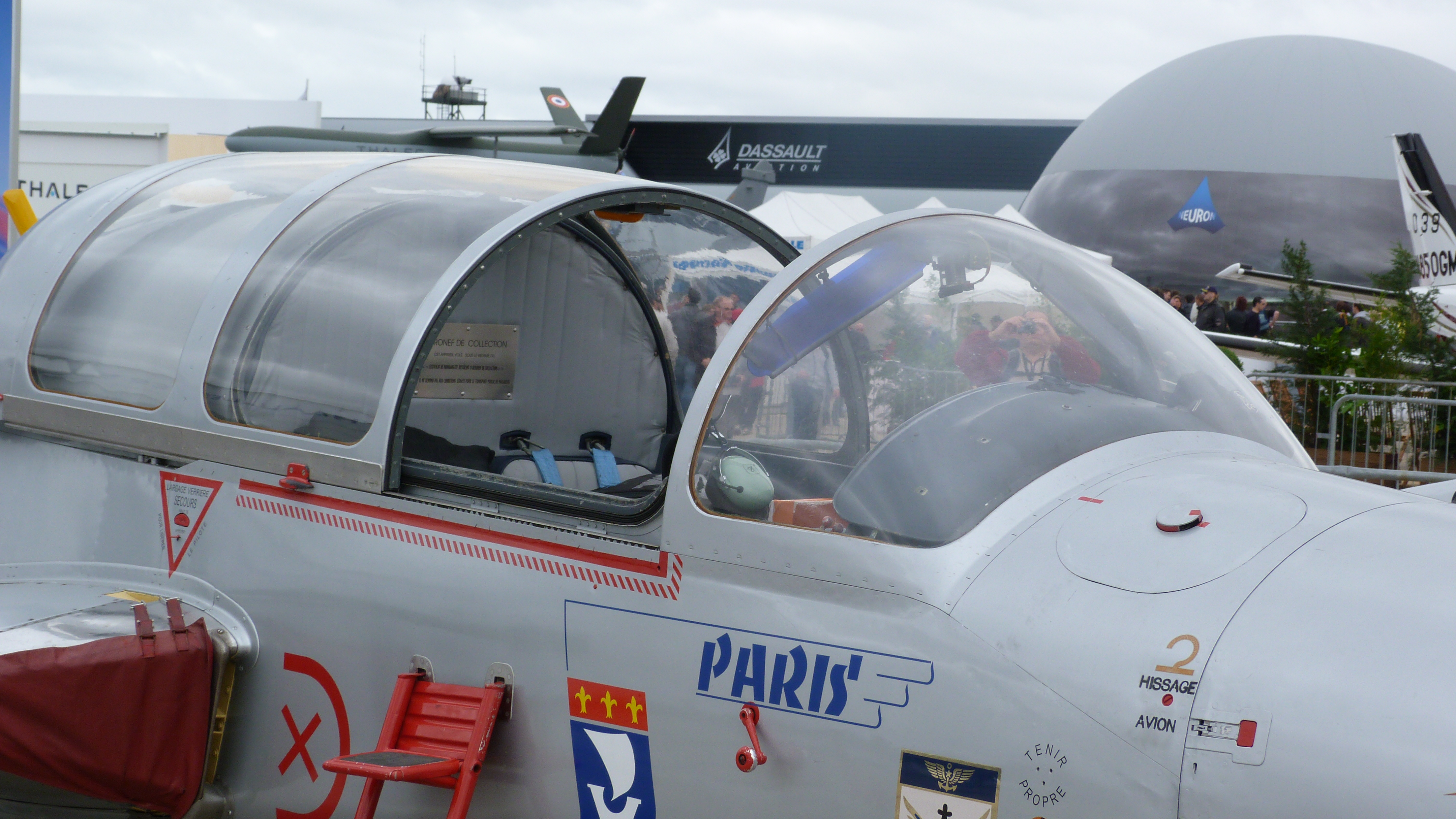 Paris Air Show 2013